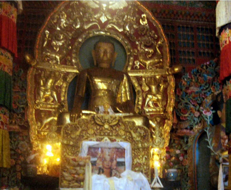 Rumtek Monastery, Sikkim.